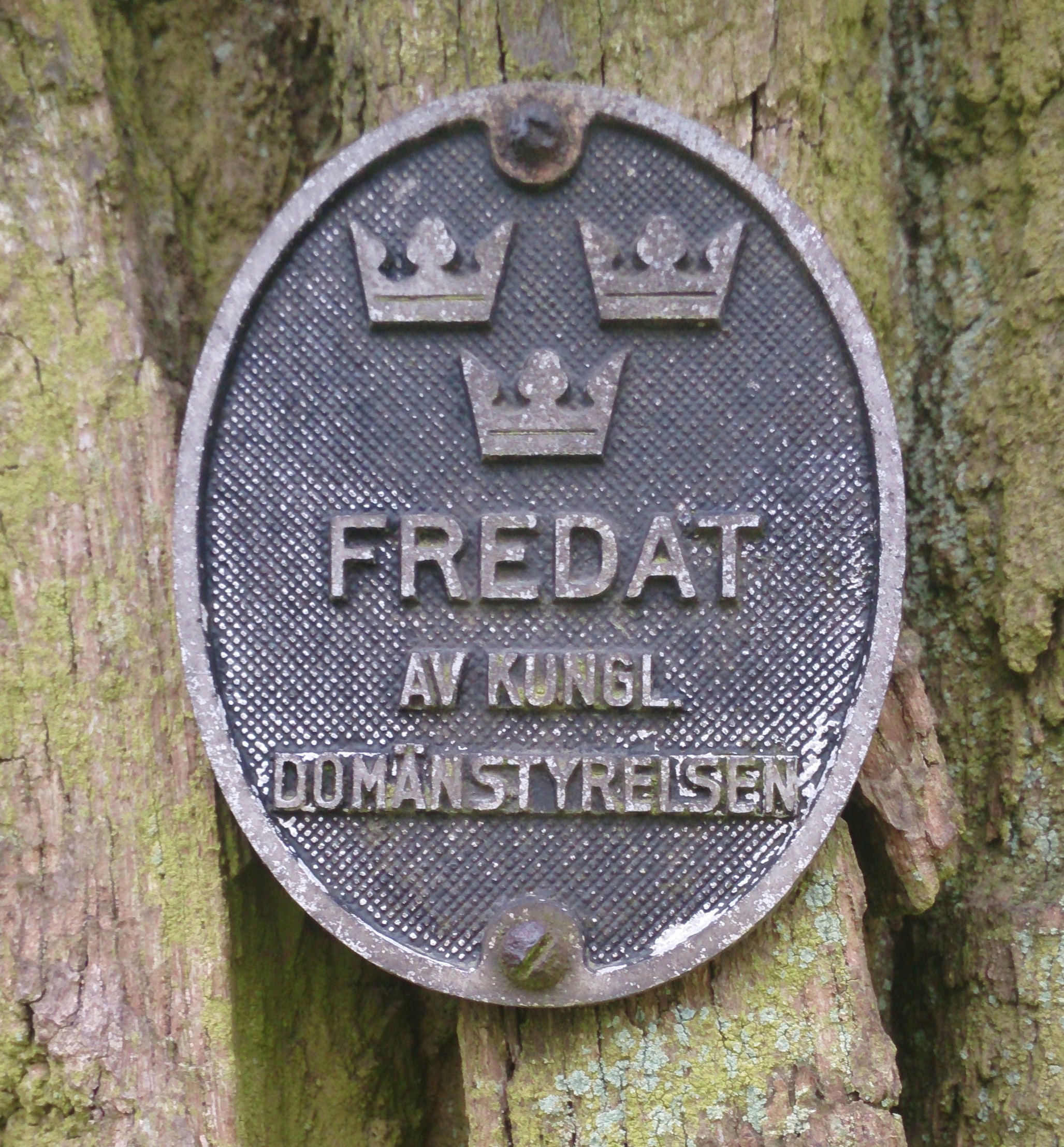 En tecken på att eken är skyddad av kungliga domänstyrelsen.